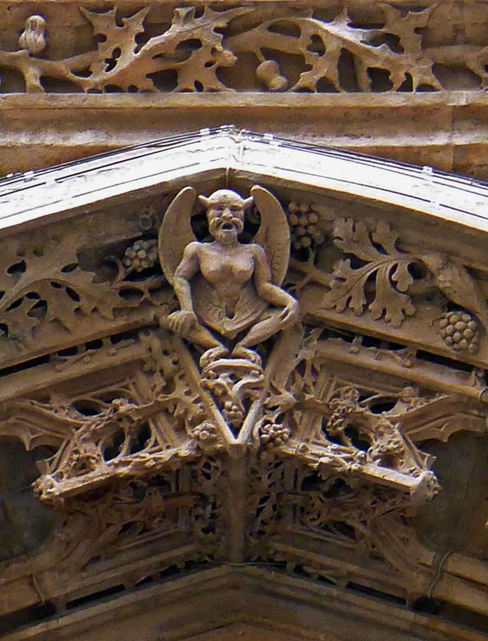 Église Saint-Merri (portail principal : détail) - Paris IV